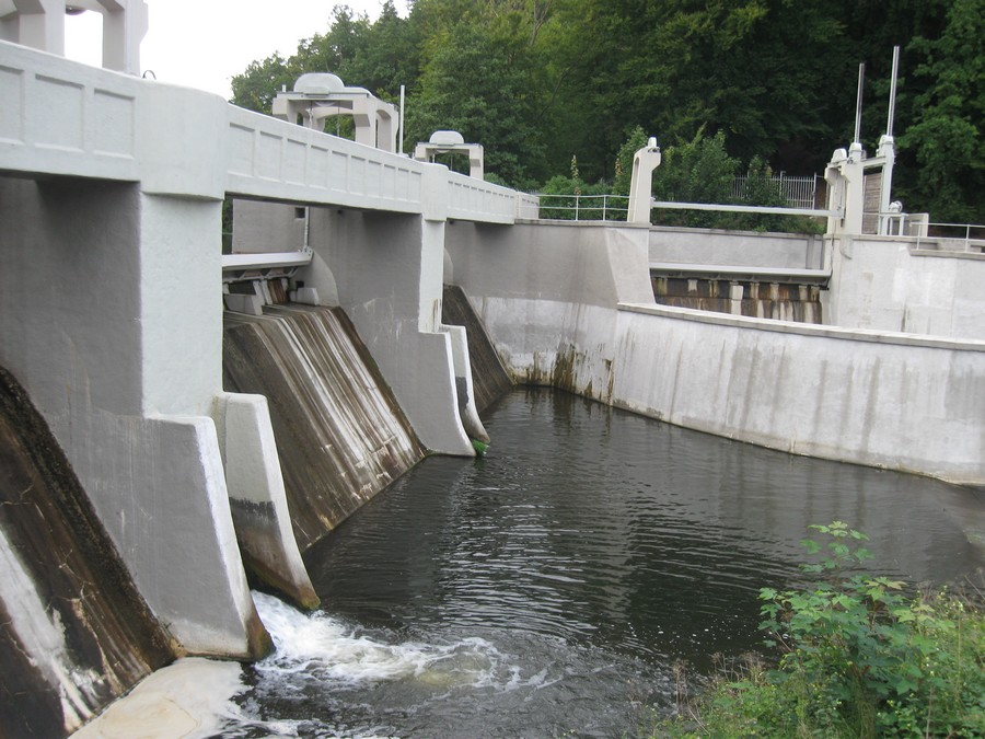 Jaz w Kolbudach